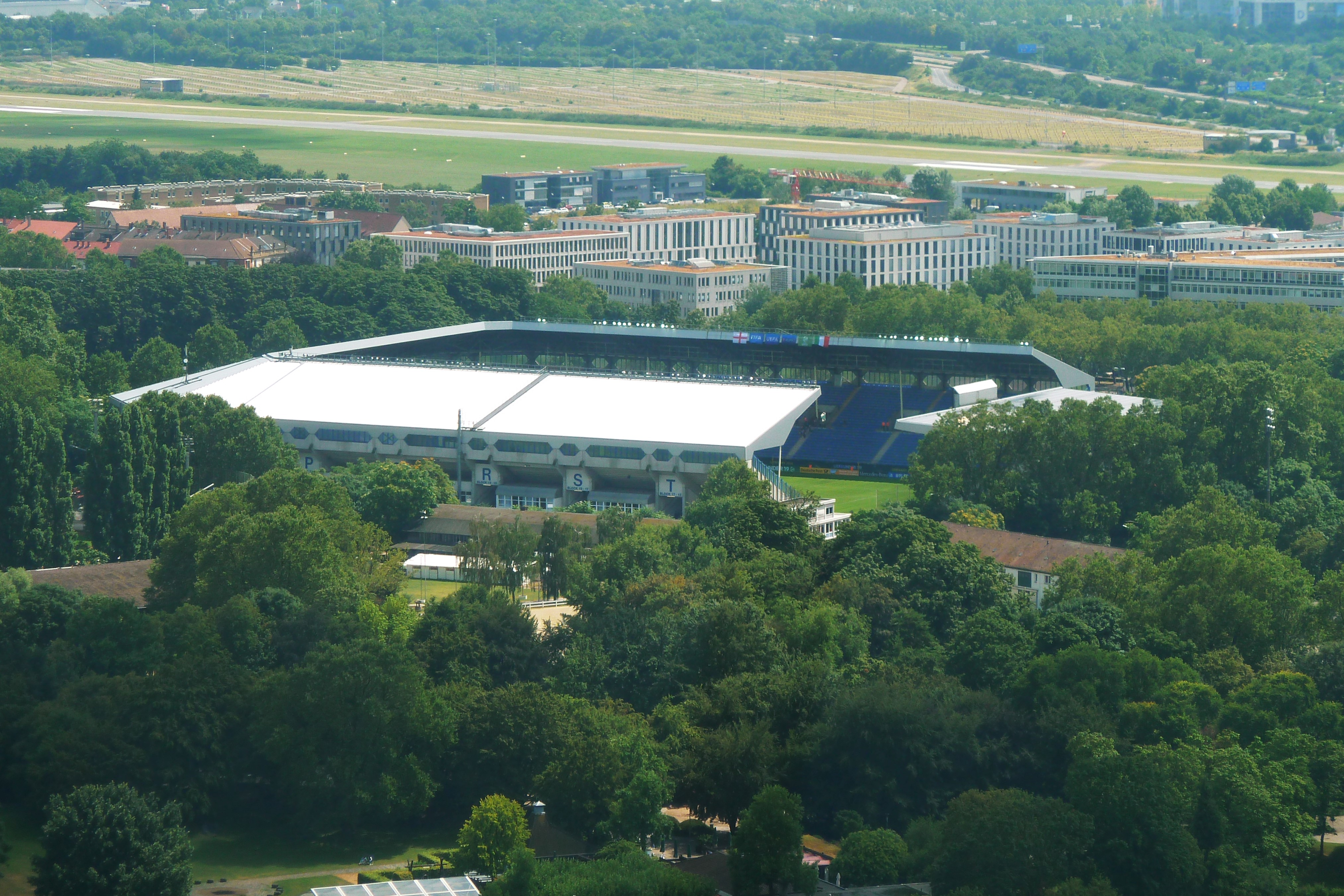 Carl-Benz-Stadion in Mannheim im Juli 2016, Blick vom Fernmeldeturm.